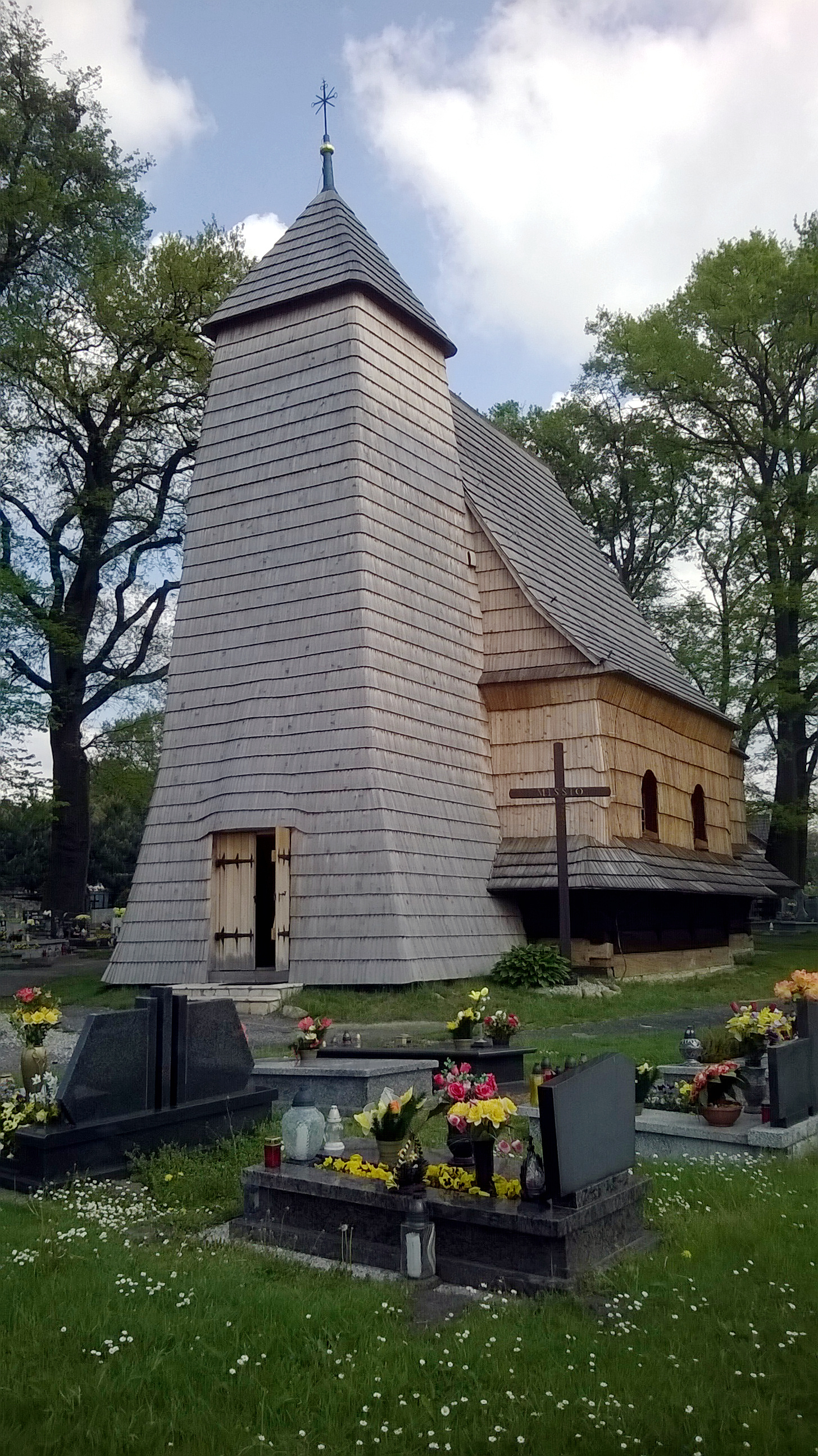 Zacharzowice, Polska